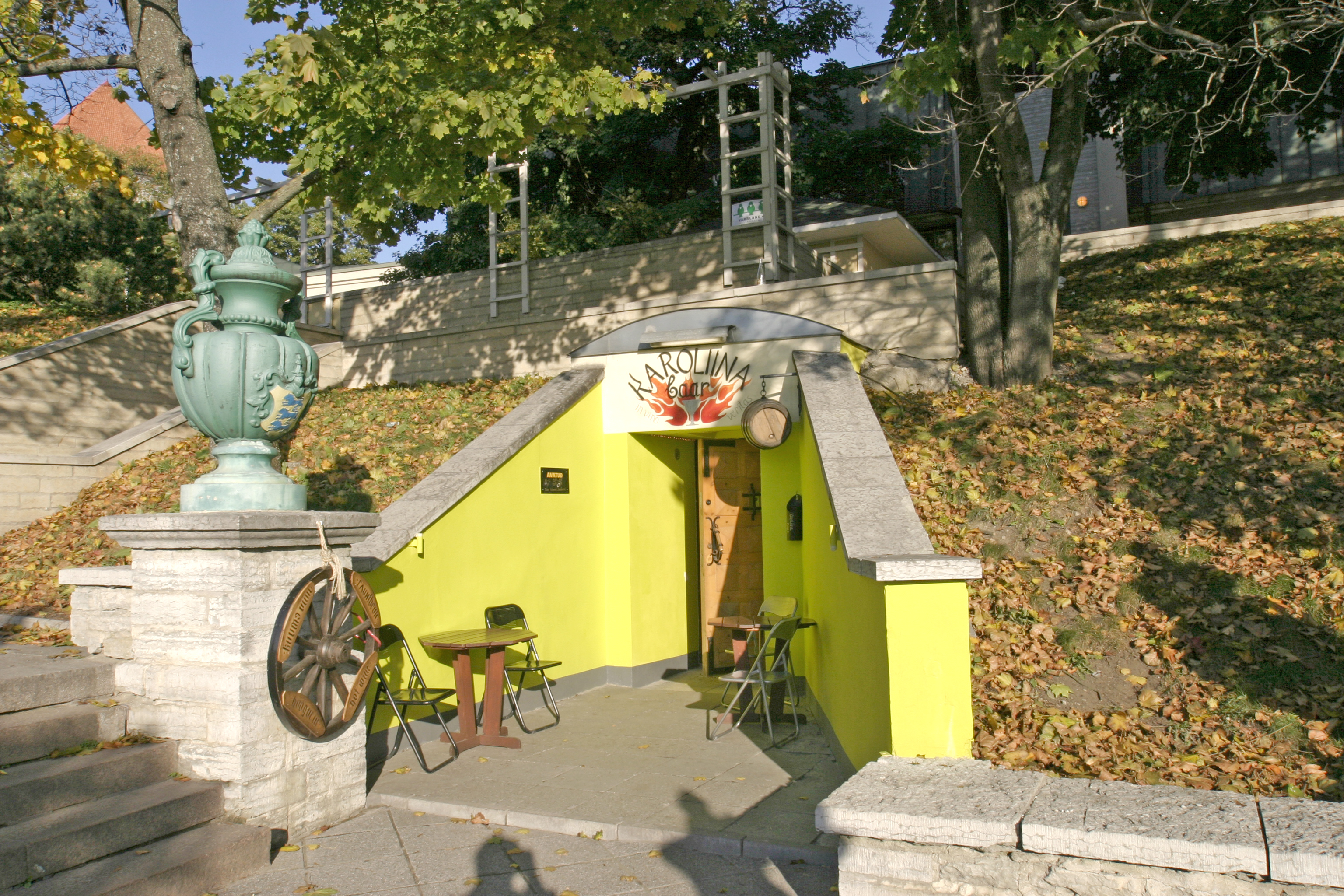 An underground bar